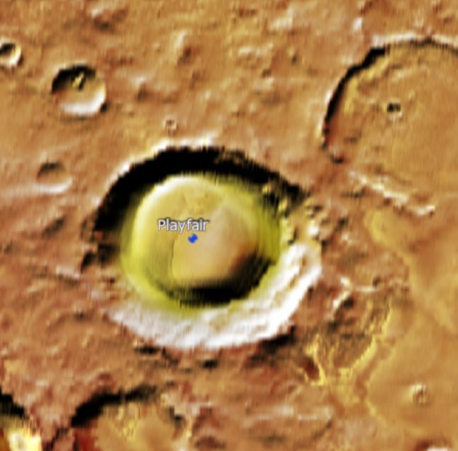 Cráter marciano Playfair. (Imagen IAU/USGS/Goddard/A SU/USGS)